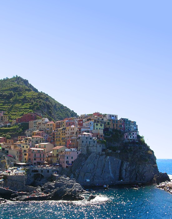 Cinque Terre: Manarola